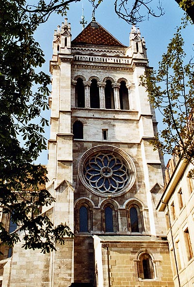 Die Kathedrale St. Peter in Genf